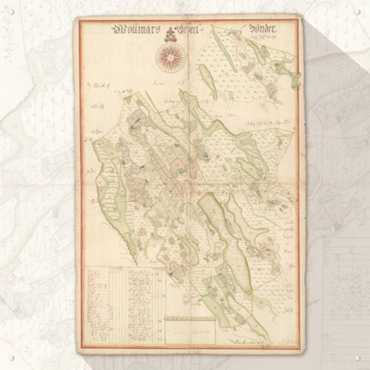 Valmieras apkaimes pamatkarte – 1681. gads.